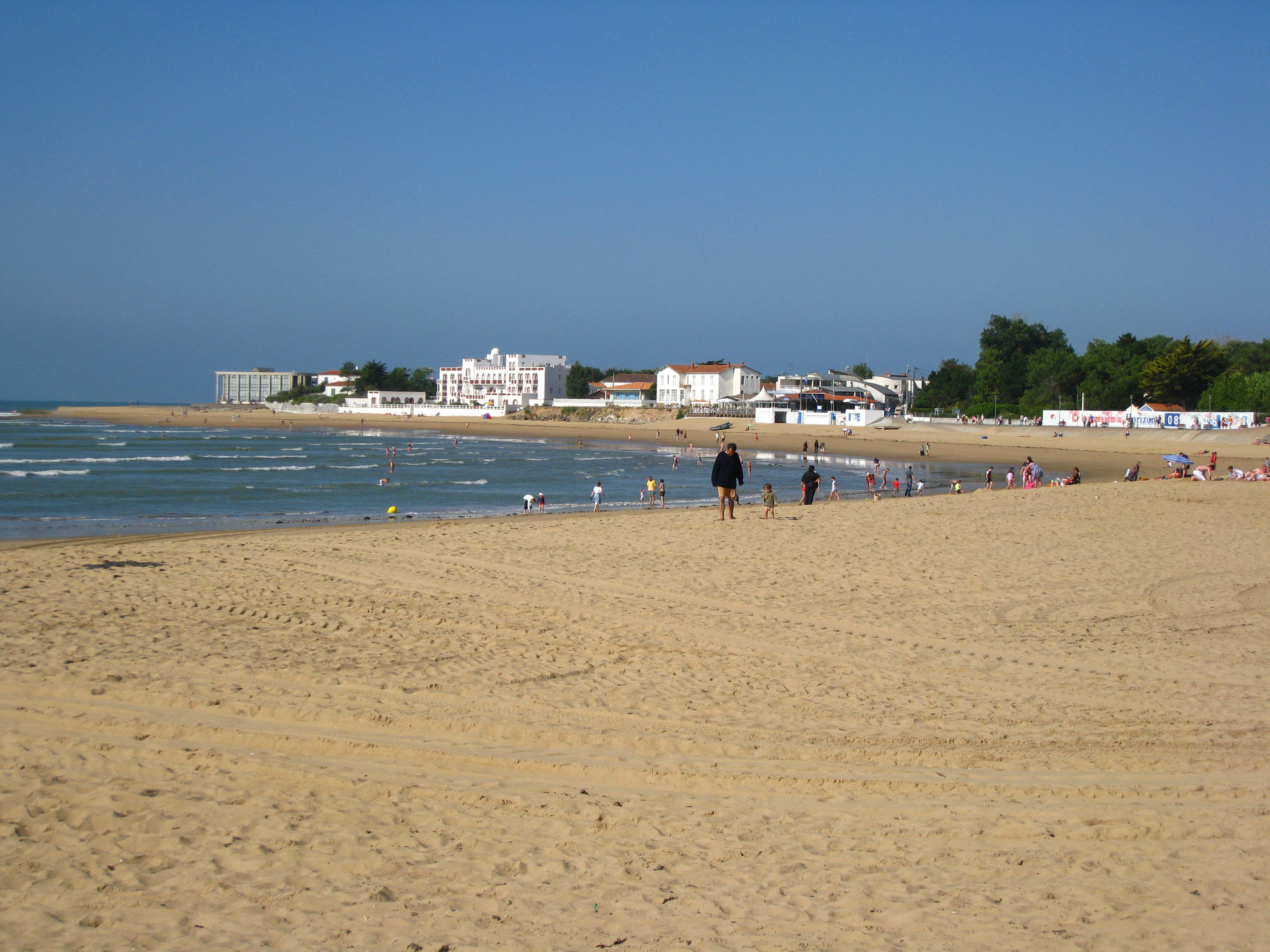 plage centrale de la Tranche-sur-Mer